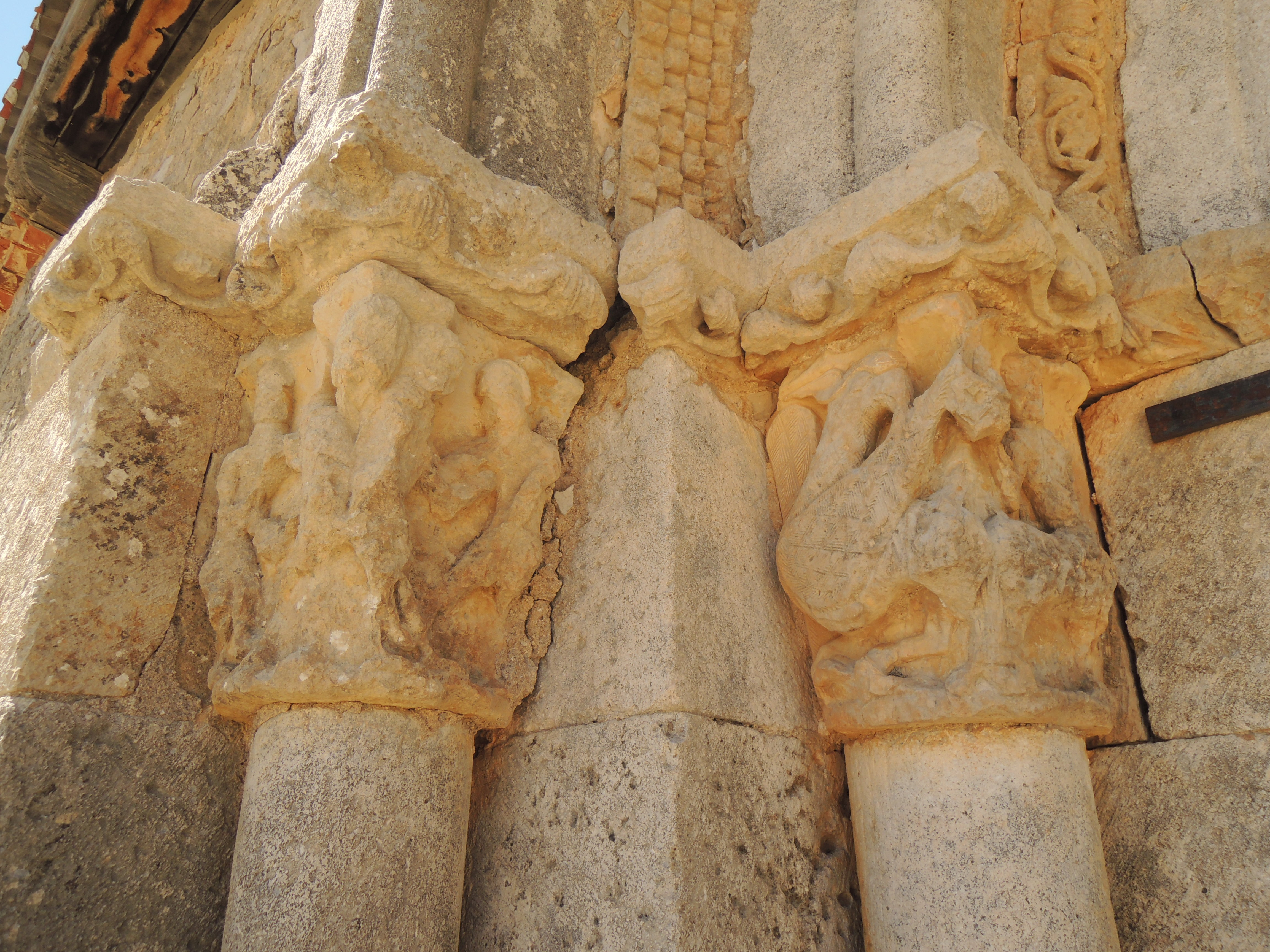 Ermita del Santo Cristo de Miranda. Santa María de las Hoyas